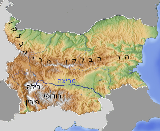 מפה טופו של בולגריה